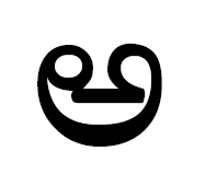 акараму